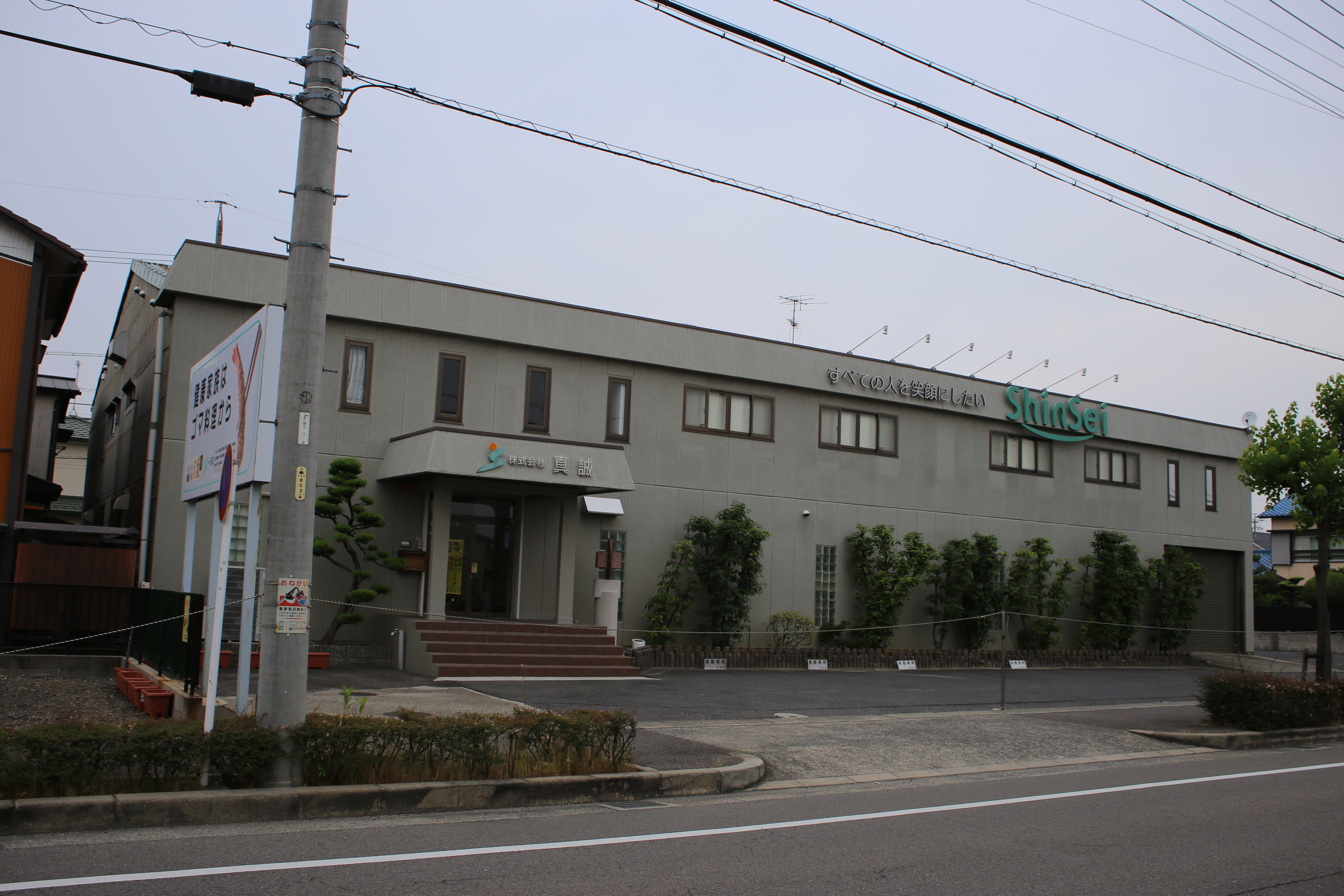 愛知県北名古屋市片場新町の真誠本社を東側公道南側より撮影